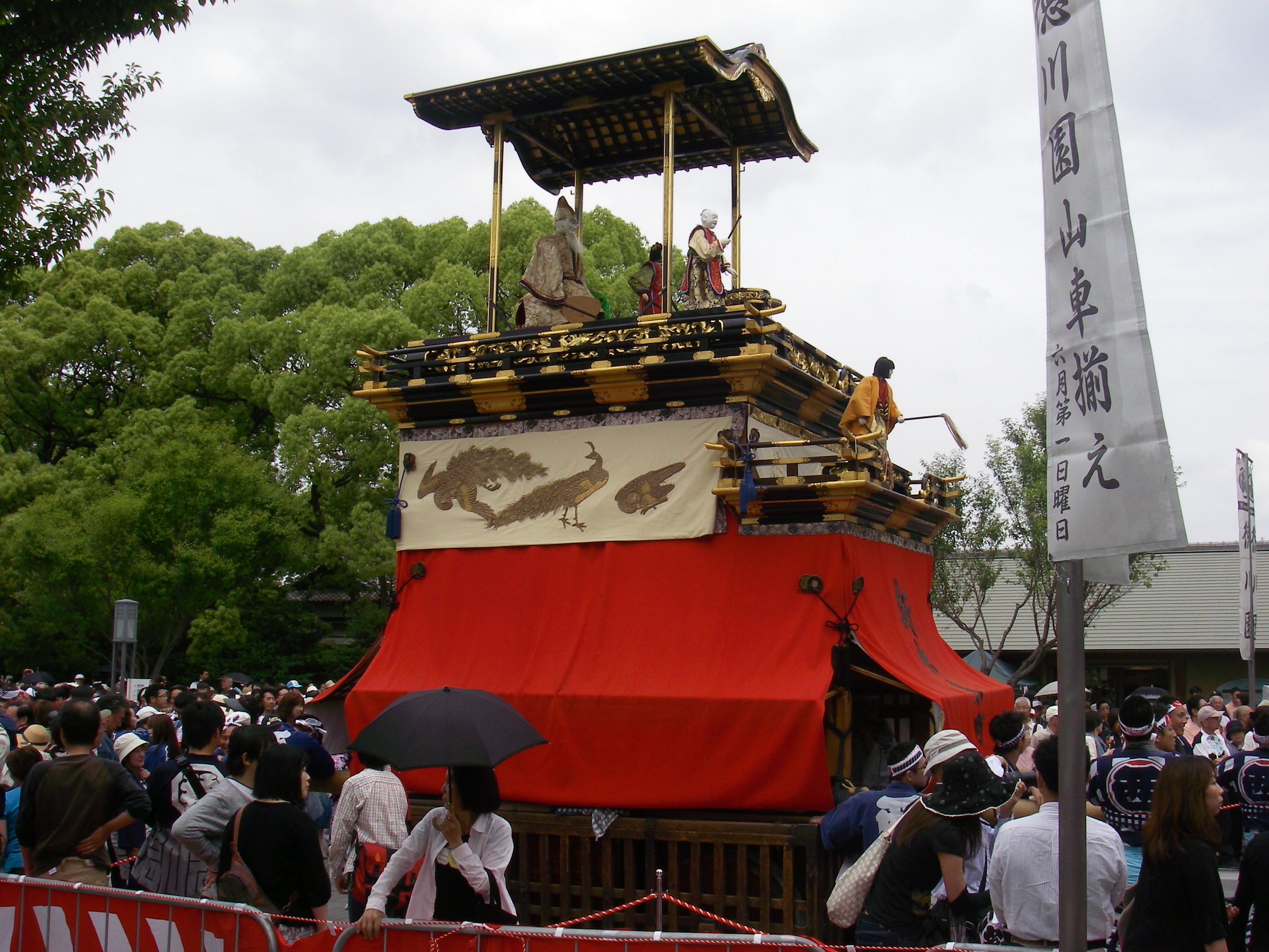 鹿子神車（名古屋市東区新出来）徳川園山車揃えにて